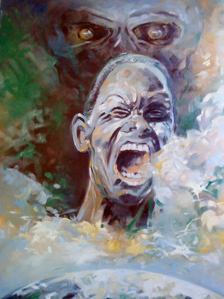 OZON GAP ‘’- rok 1998, 105x70, olej na płótnie , fotografia Marek Kubski